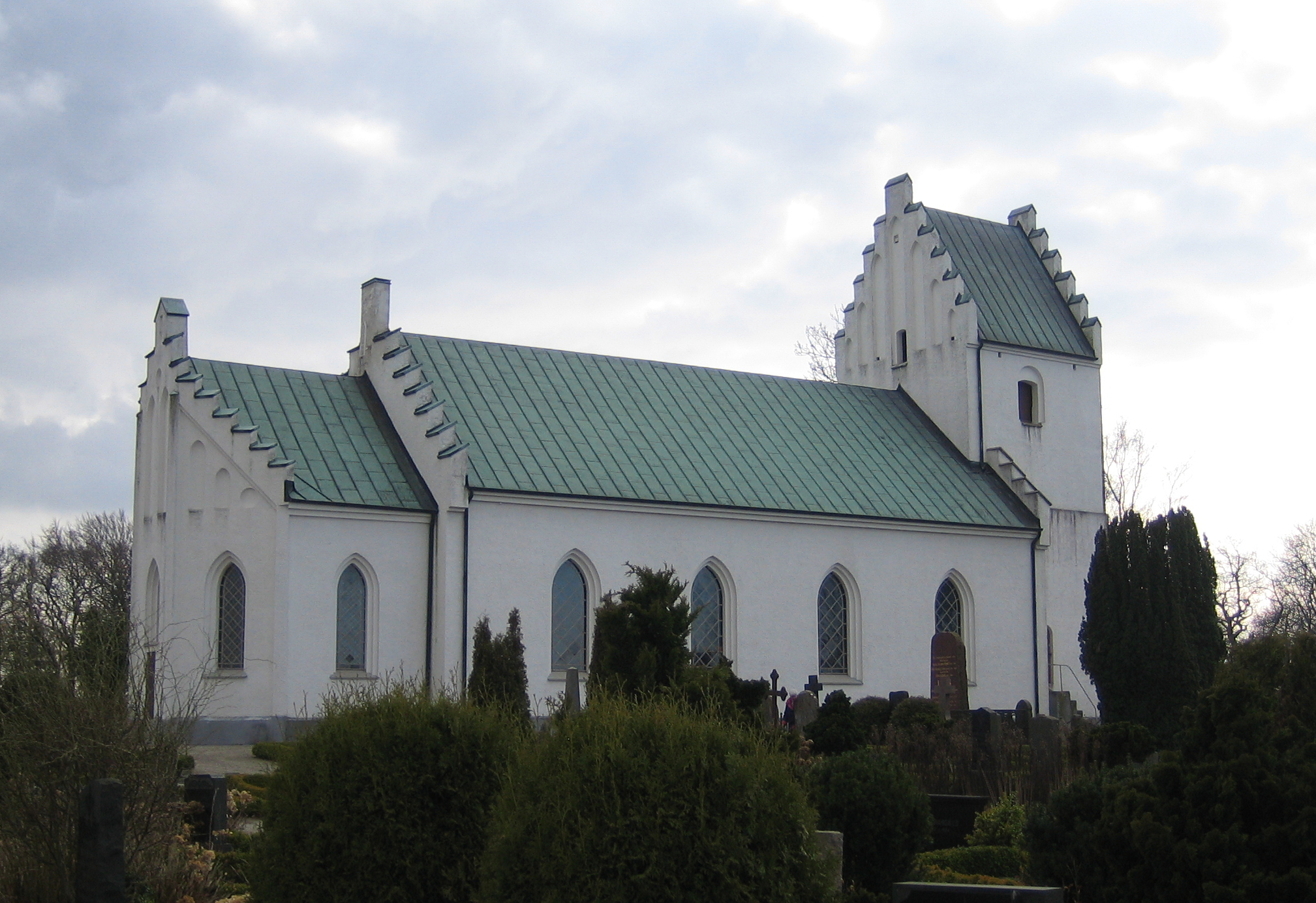 Rängs kyrka, Skåne, Sweden